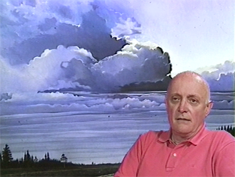 Portrait de Denis Rivière